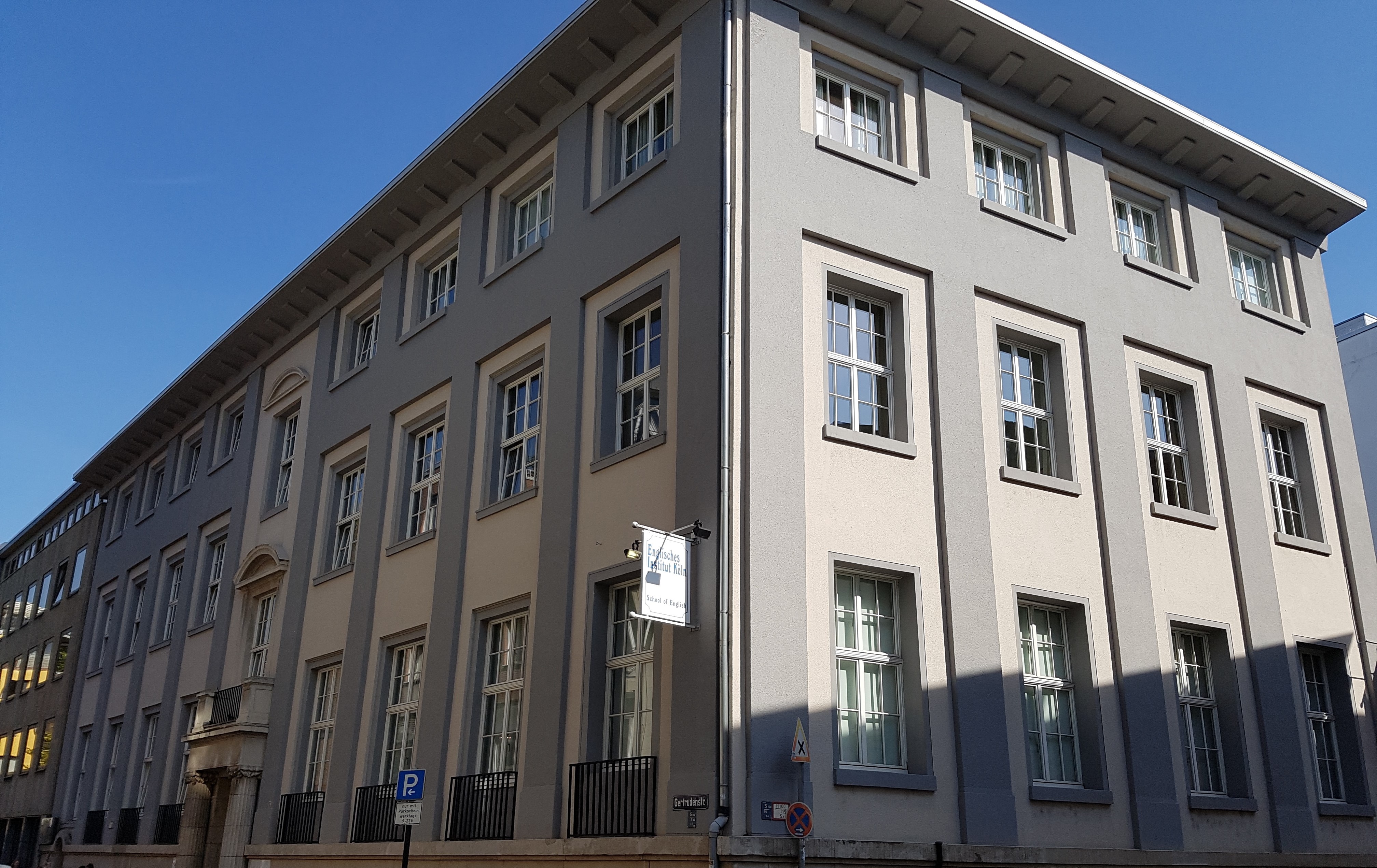 Verwaltungsgebäude, Gertrudenstr. 24-28This is a photograph of an architectural monument.